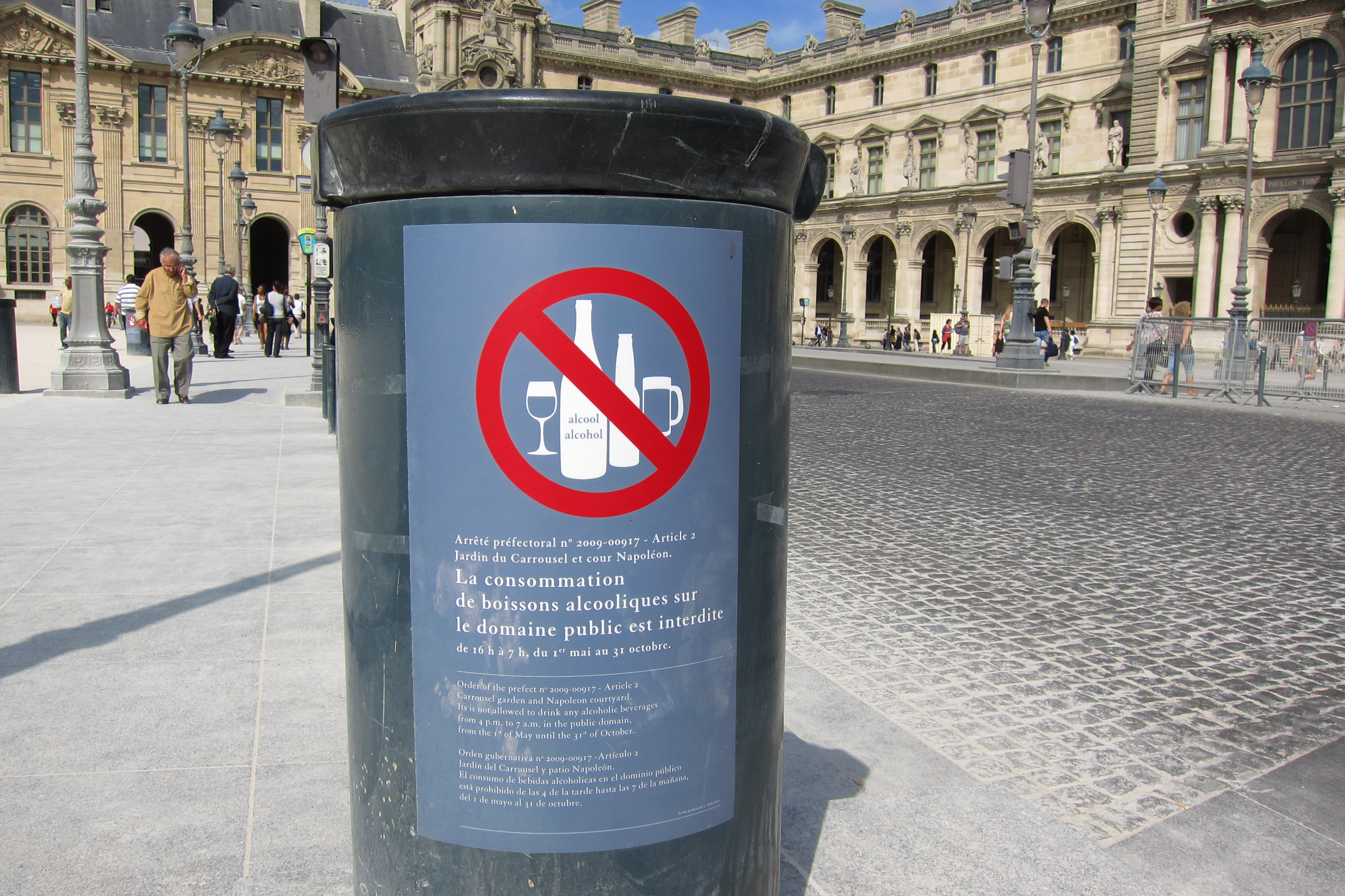 Paris (France) : Place du Carrousel : Poubelle avec avis d'interdiction de consommation d'alcool.